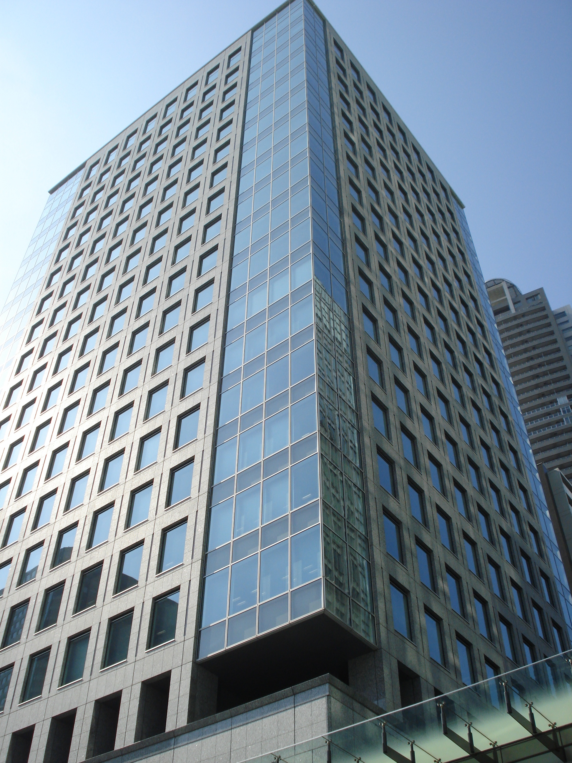 Shiodome Hamarikyu Building